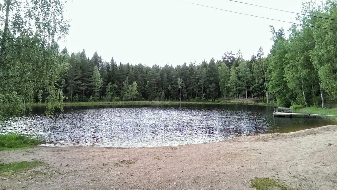 Ryttylän Ykslammen ranta